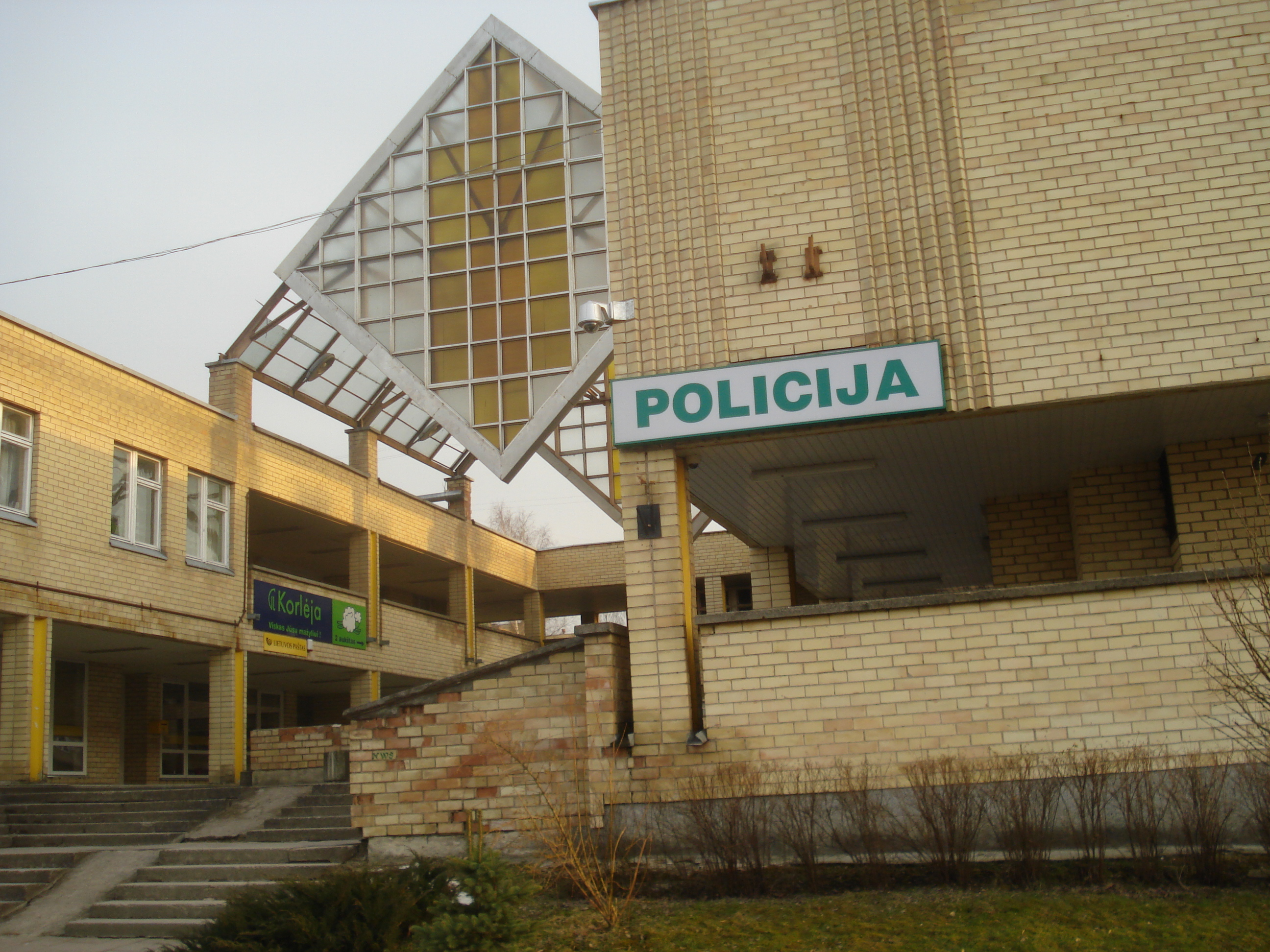 The centre of services in Naujoji Vilnia. Gerovės g. 29. Project by Elena Nijolė Bučiūtė. 1988